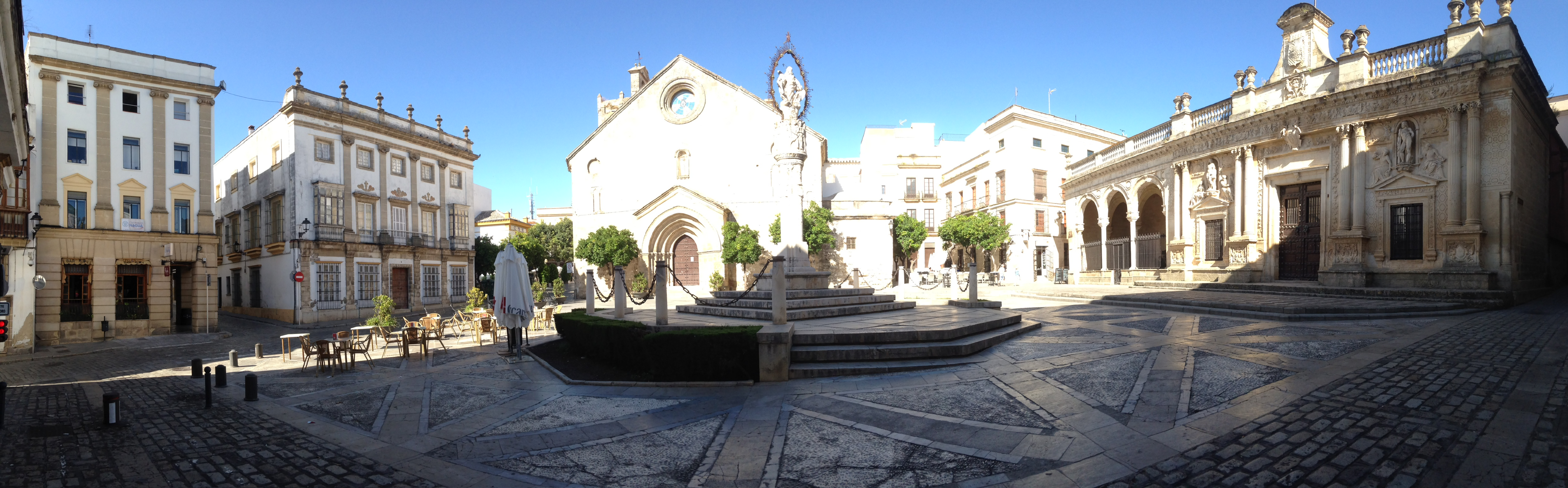 Pza. Asuncion Jerez